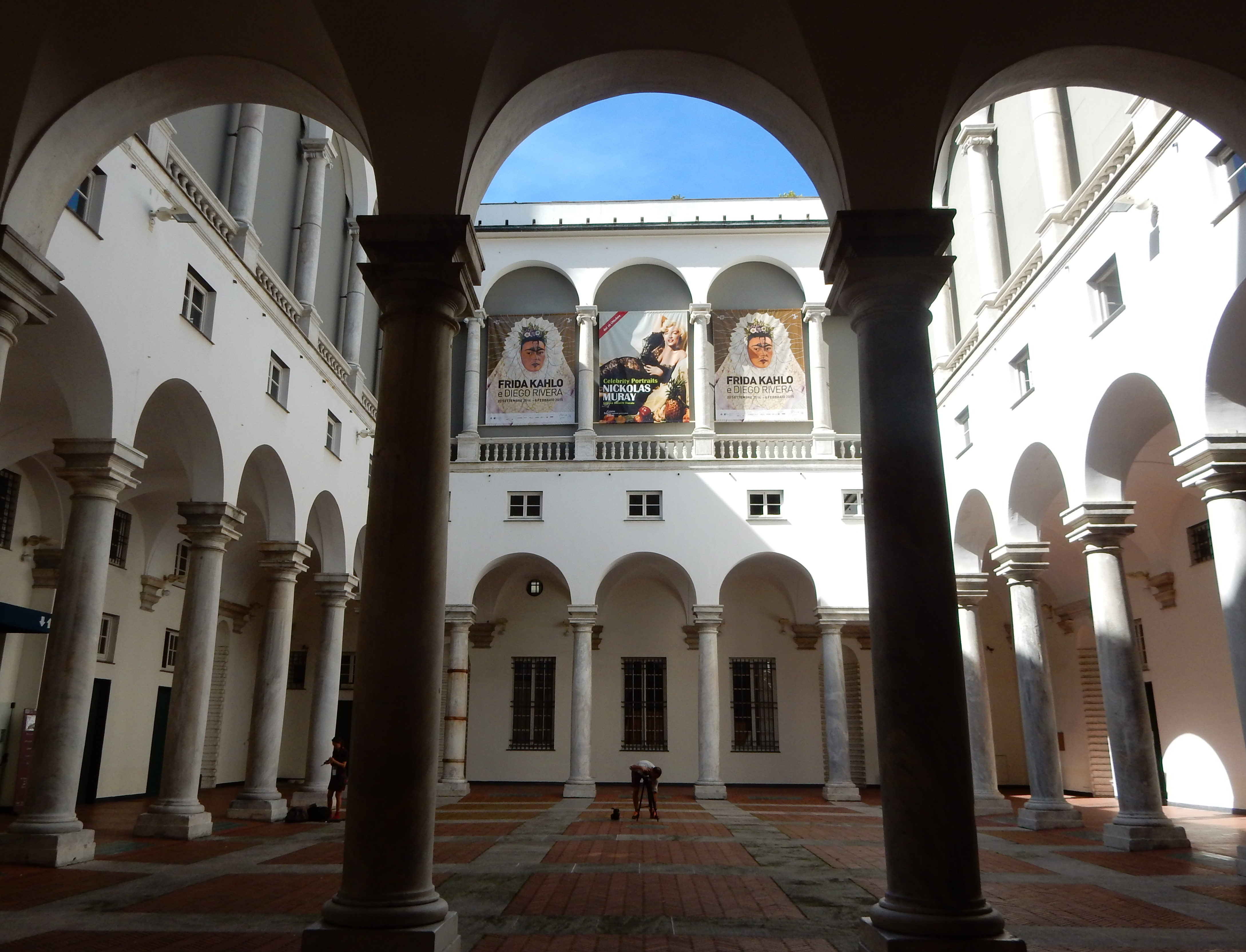 Palazzo Ducale di Genova This is a photo of a monument which is part of cultural heritage of Italy.